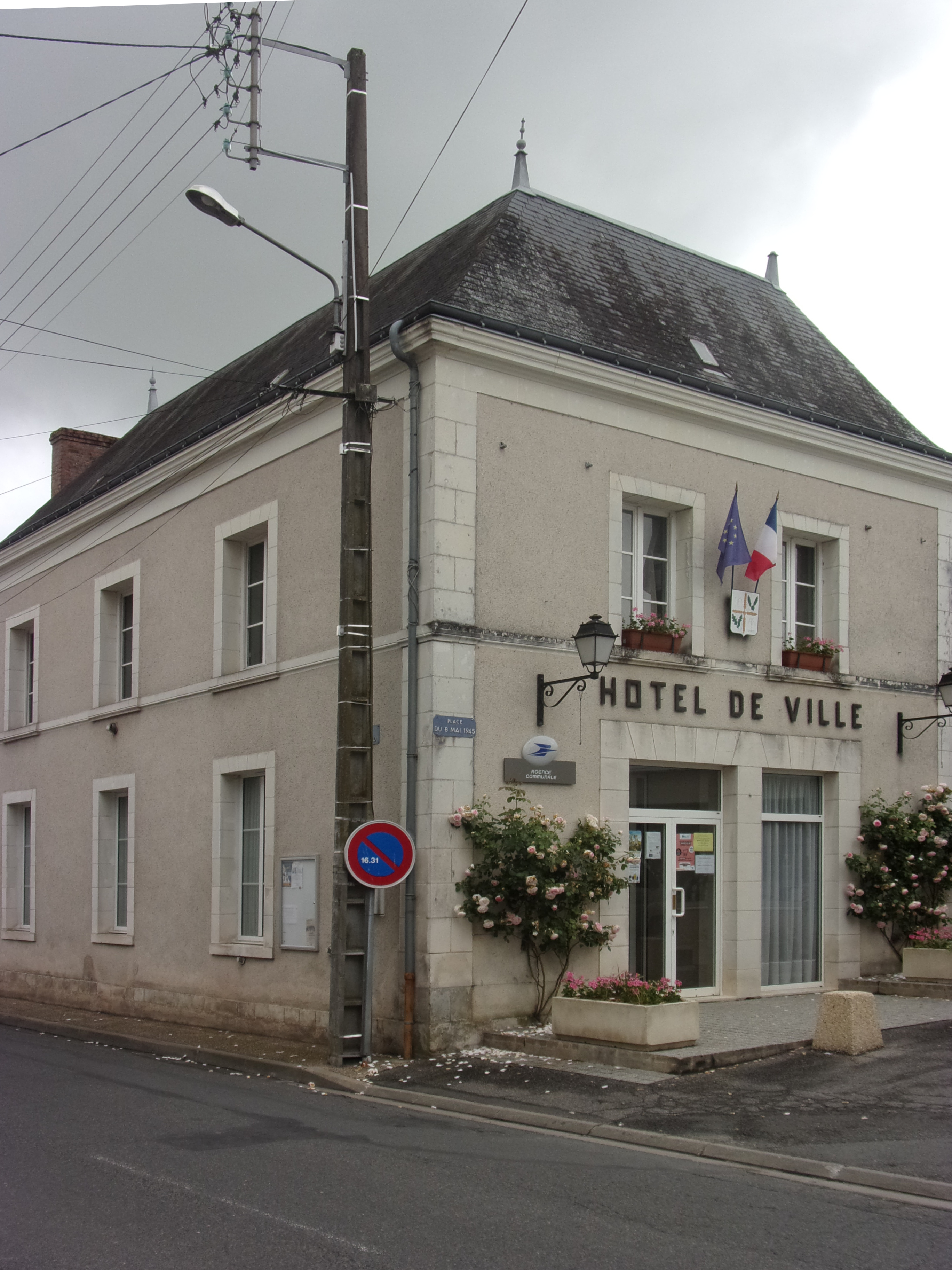 Mairie de Nouans-les-Fontaines